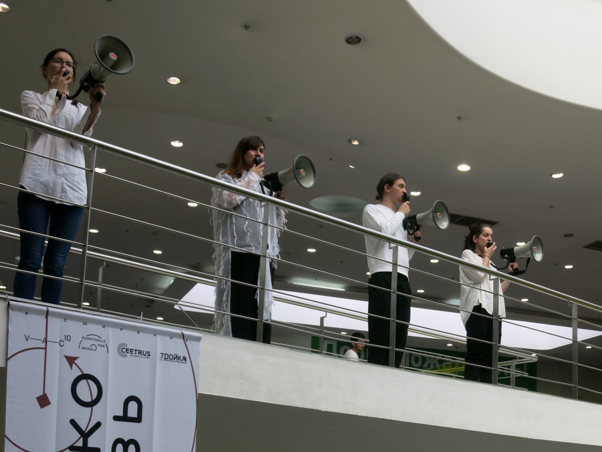 Музыкальный перформанс «Дальше только громкая связь» (на англ. «Further is just speakerphone») художника Виктора Алимпиева и композитора Алексея Коханова в торговом центре «Тройка». Москва, 14 сентября 2019 г. Принадлежит серии перформансов «Московские соло. Кунстхалле музыки», проходивших на городских рынках и в ТДК «Тройка» в августе и сентябре 2019 года. Инициаторы и организаторы всей серии — проект композитора Ари Бенджамина Мейерса «Кунстхалле музыки» (Kunsthalle for Music) и фонд V-A-C. Относится к программе фонда V-A-C «Расширение пространства. Из центра». Перформанс «Дальше только громкая связь» показывался на этой площадке как минимум 18 раз, с 22 августа по 14 сентября 2019 г.